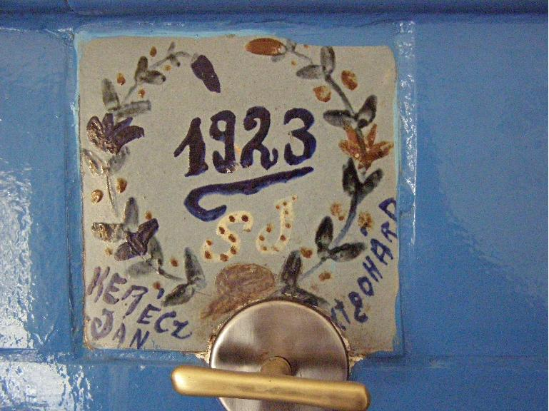 A képen Kerécz János XX. század elején élt fazekas 1923-ban készített kályhacserepe látható